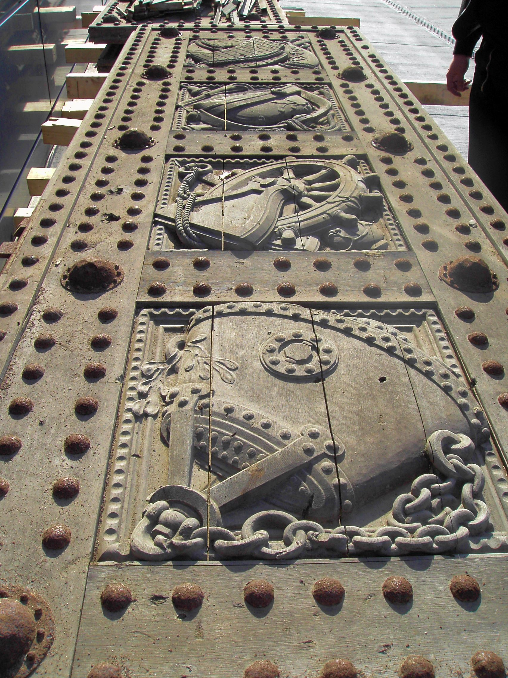 Türblatt des Reichsmarineamts vor der Restaurierung durch das Militärhistorische Museum der Bundeswehr